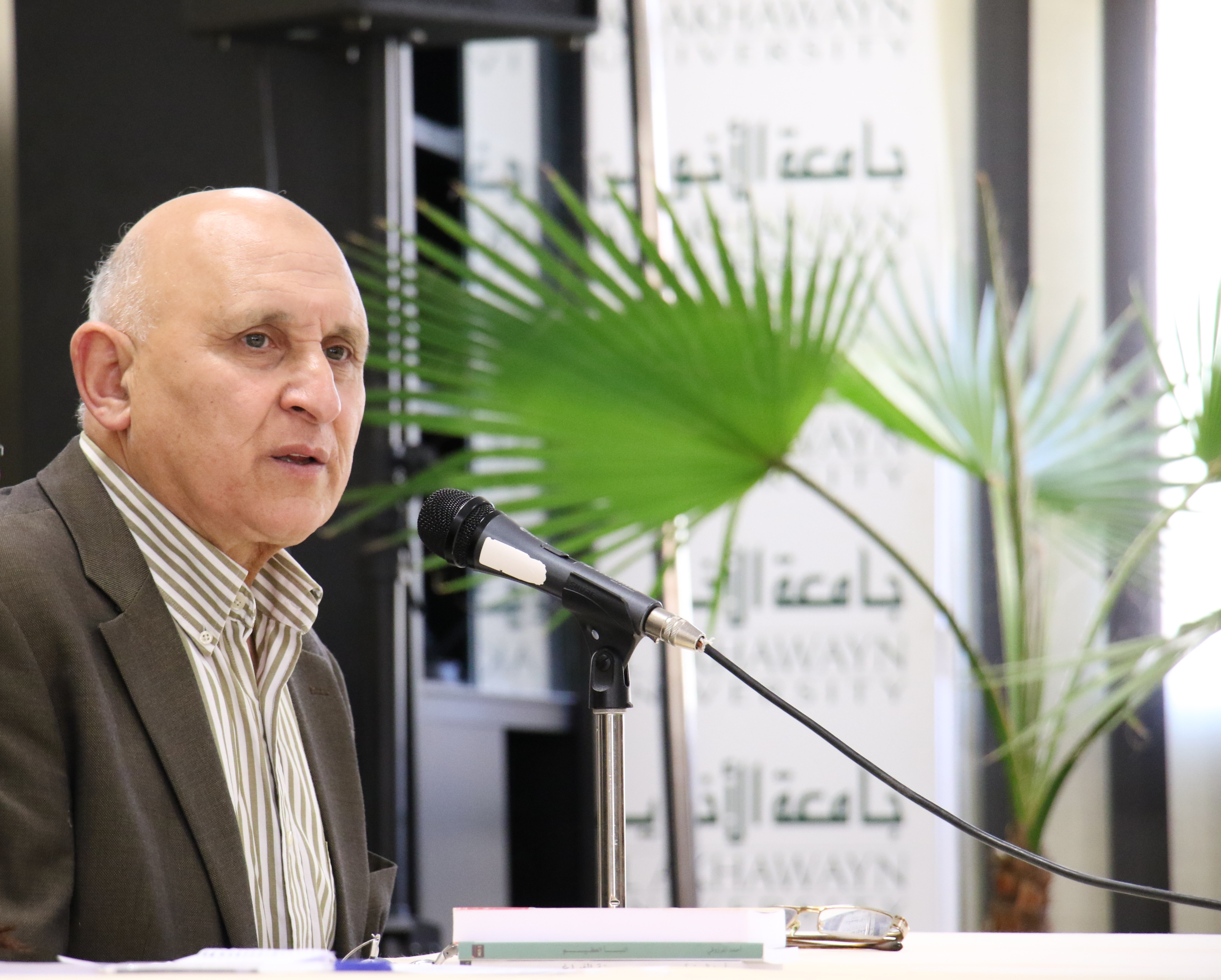 L’écrivain marocain Ahmed Marzouki lors d'un talk, le 21 mars 2017 à Ifrane.